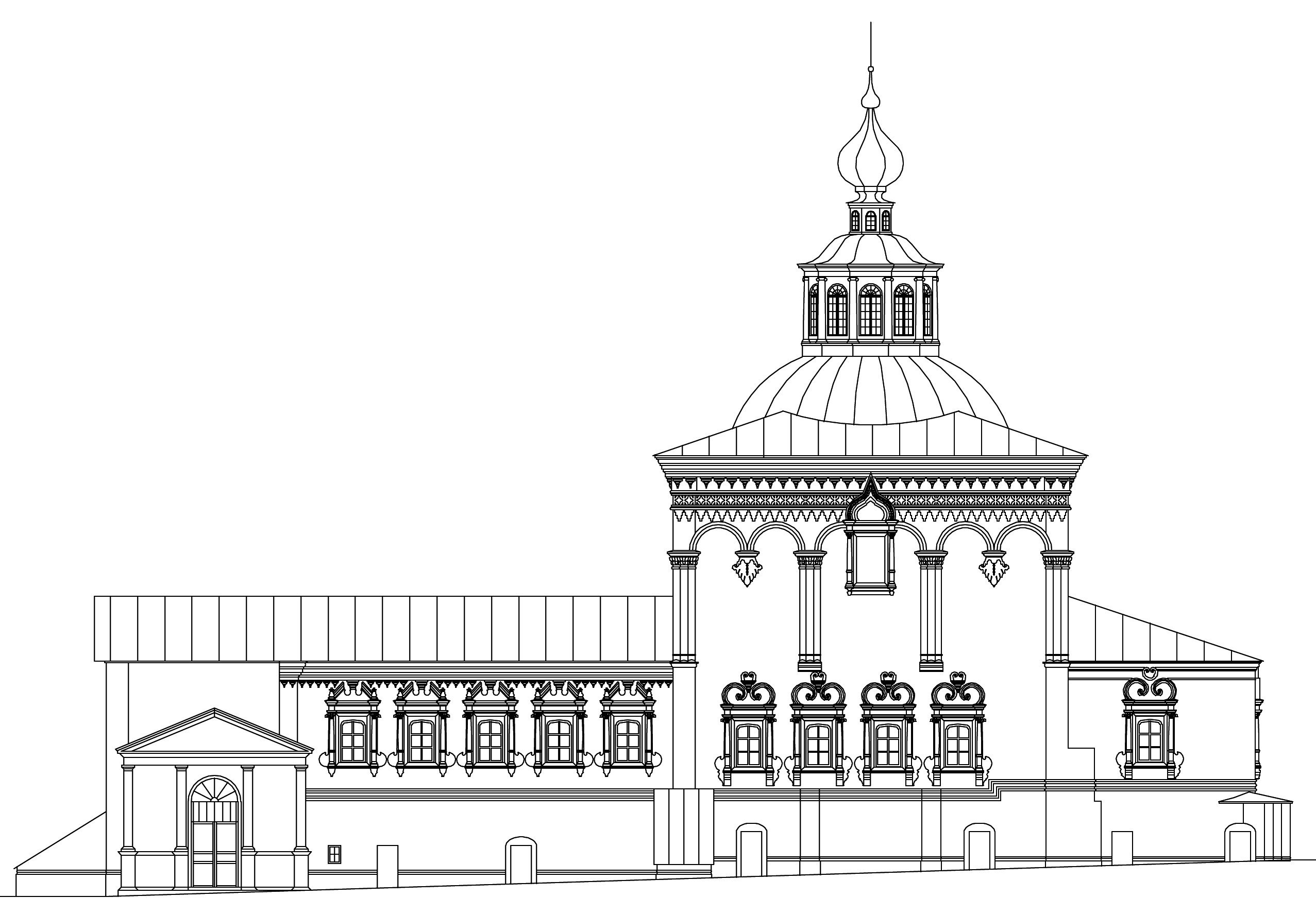 Крестовоздвиженский собор. Чертёж. Первоначальный вид. Город Соликамск